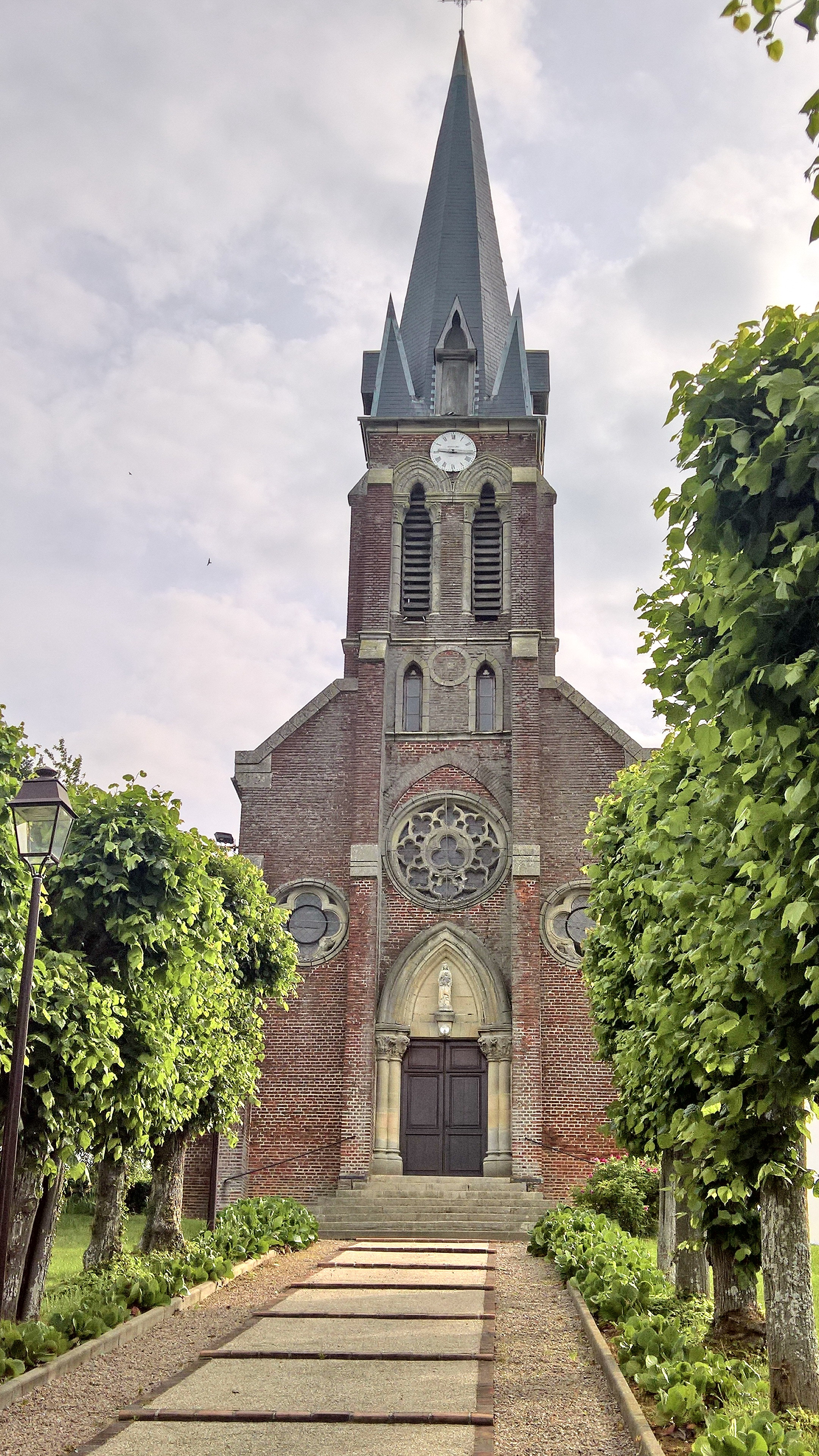 Maisoncelle-Tuilerie : l'église saint-Claude